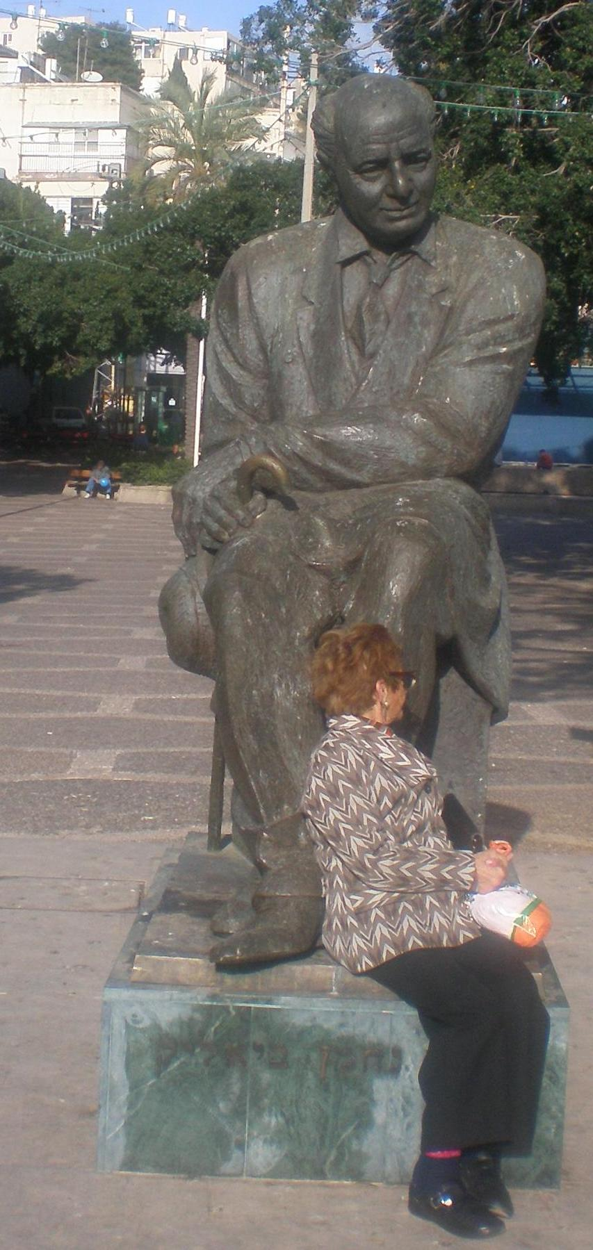 Bialik statue, Ramat Gan, Rambam square